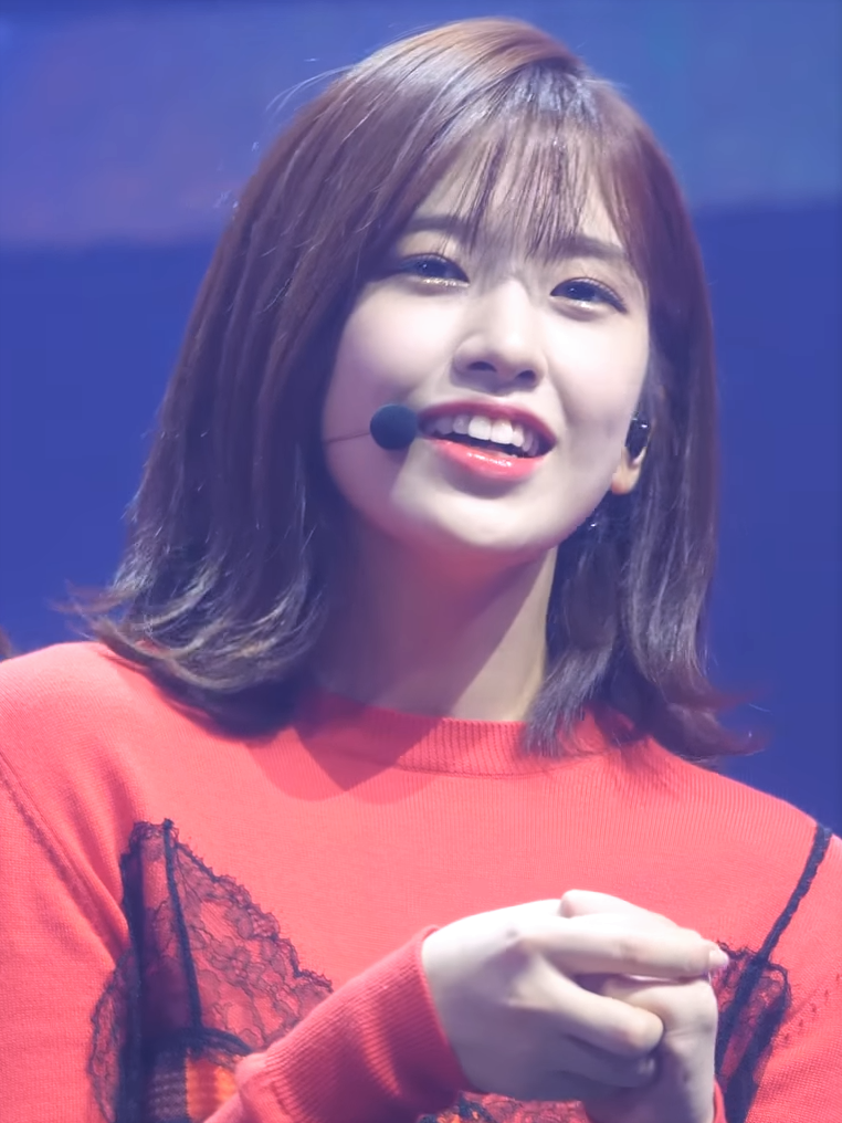 아이즈원 (IZ*ONE) '멤버별 데뷔소감' 직캠 Fancam @IZ*ONE SHOW-CON